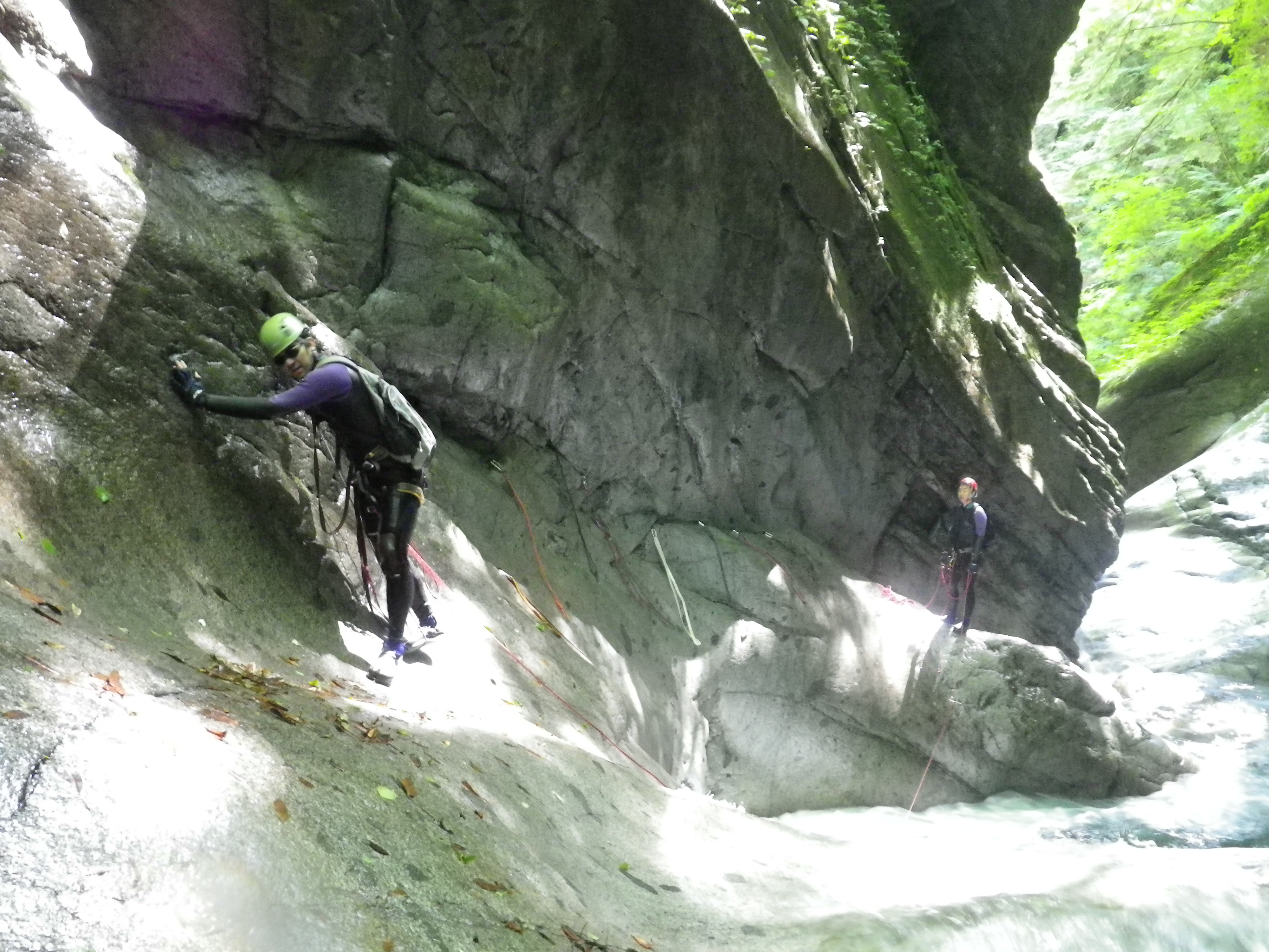 ヘルメットを着け、沢を登攀する様子